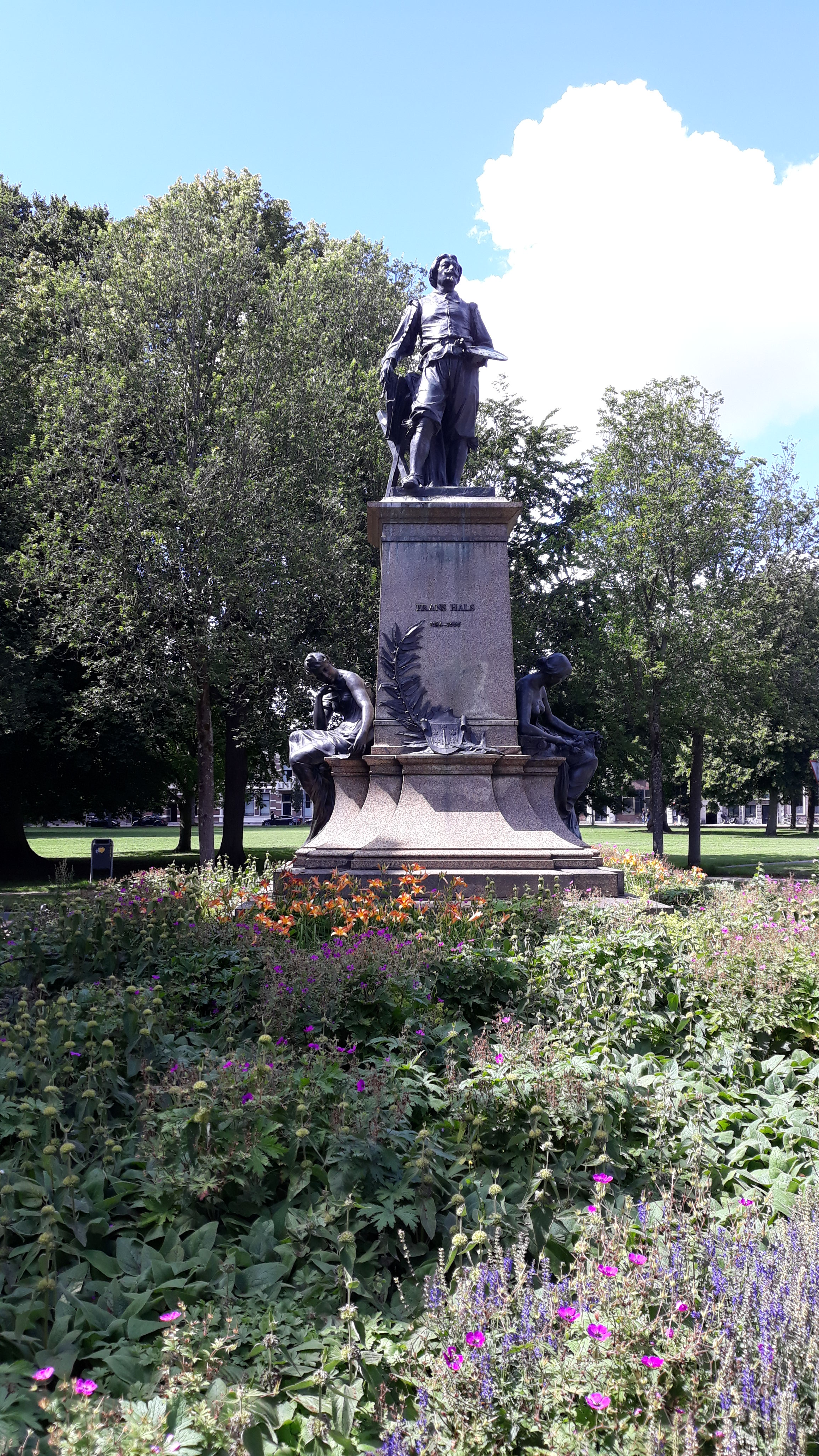 Das Denkmal für den niederländischen Maler Frans Hals im Florapark in Haarlem.